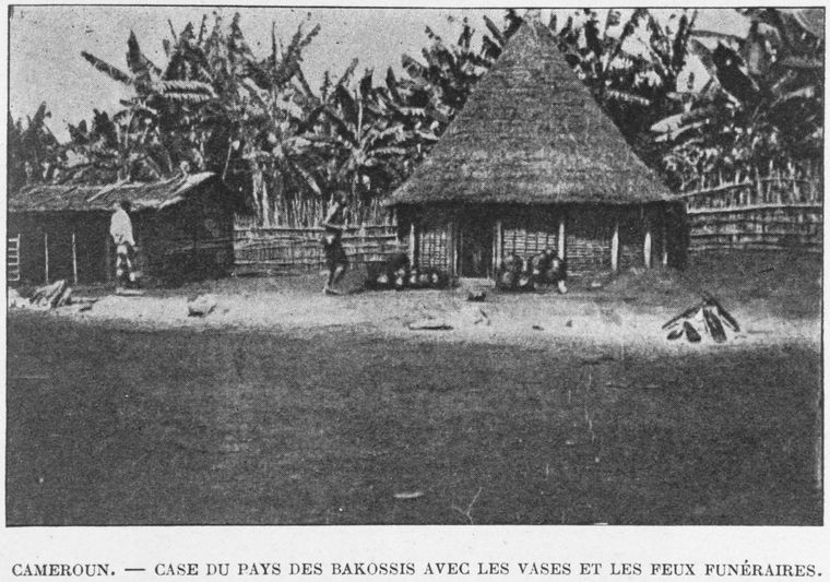 Cameroun. Case du pays des bakossis avec les vases et les feux funéraires. From issions de Gironcourt en Afrique occidentale, 1908/1909 - 1911/ 1912; documents scientifiques, publies avec le concours de l'Academie des sciences (Fonds Bonaparte), de l'Academie des inscriptions et belles-lettres, et de la Societe de geographie (published 1920).